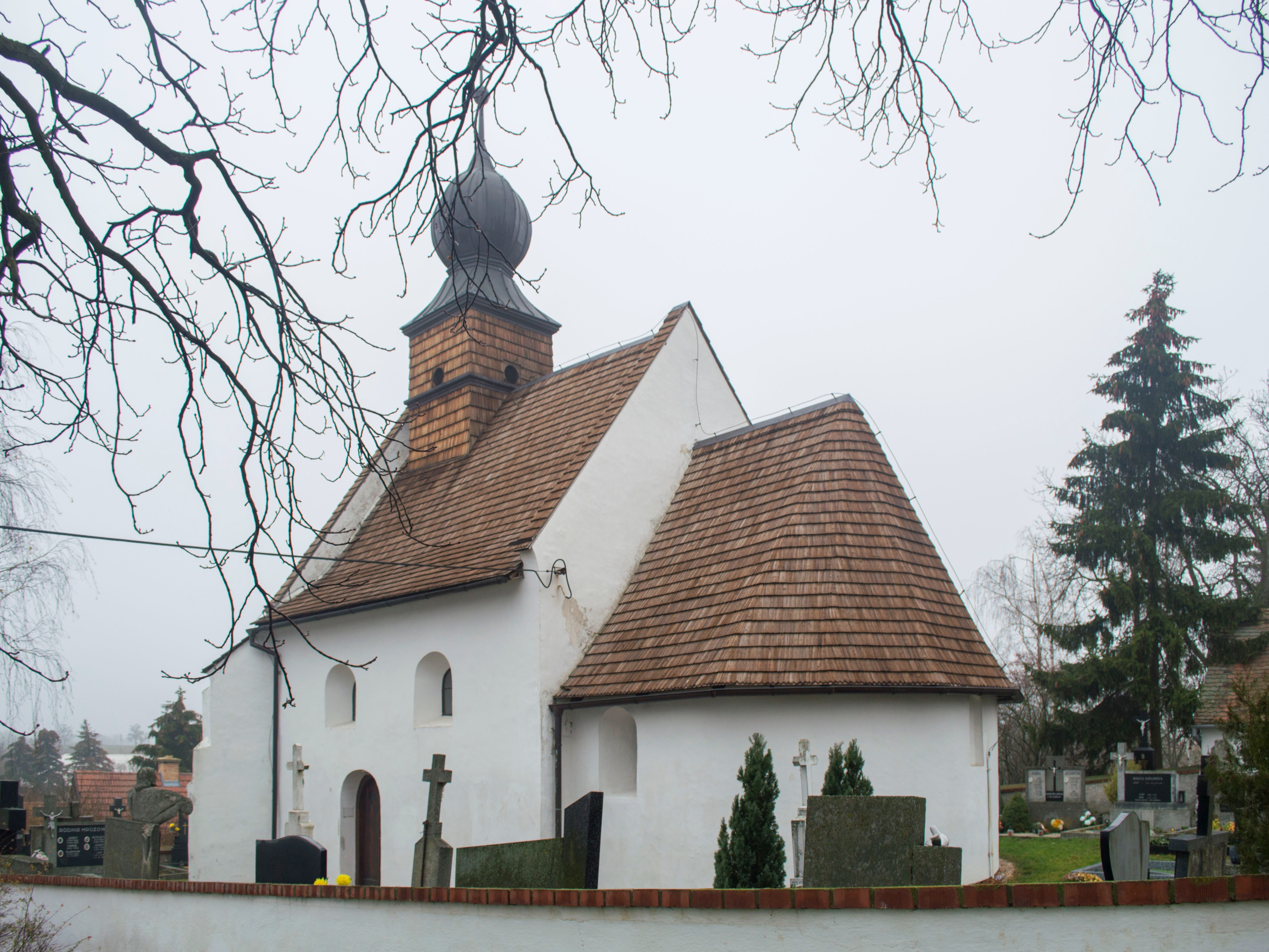 Kostel Všech svatých, Přeskače.